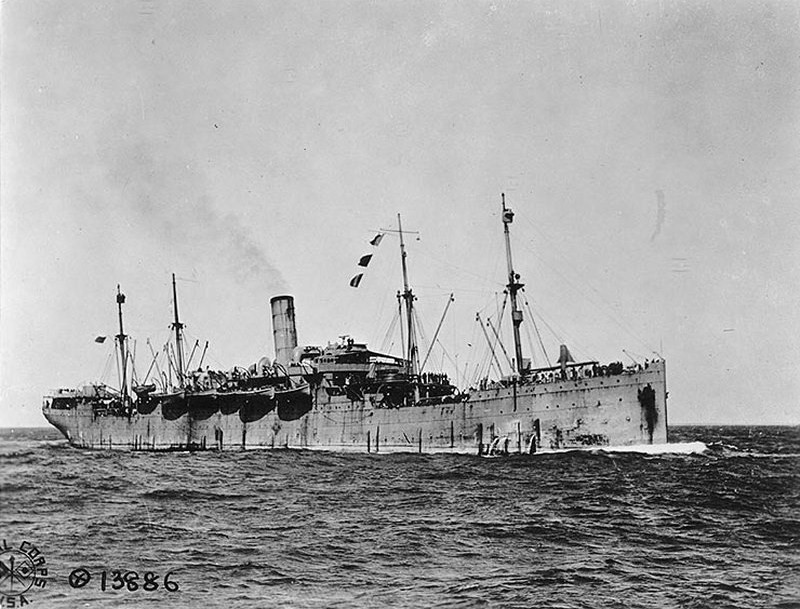 USS Susquehanna (ID-3016) was underway